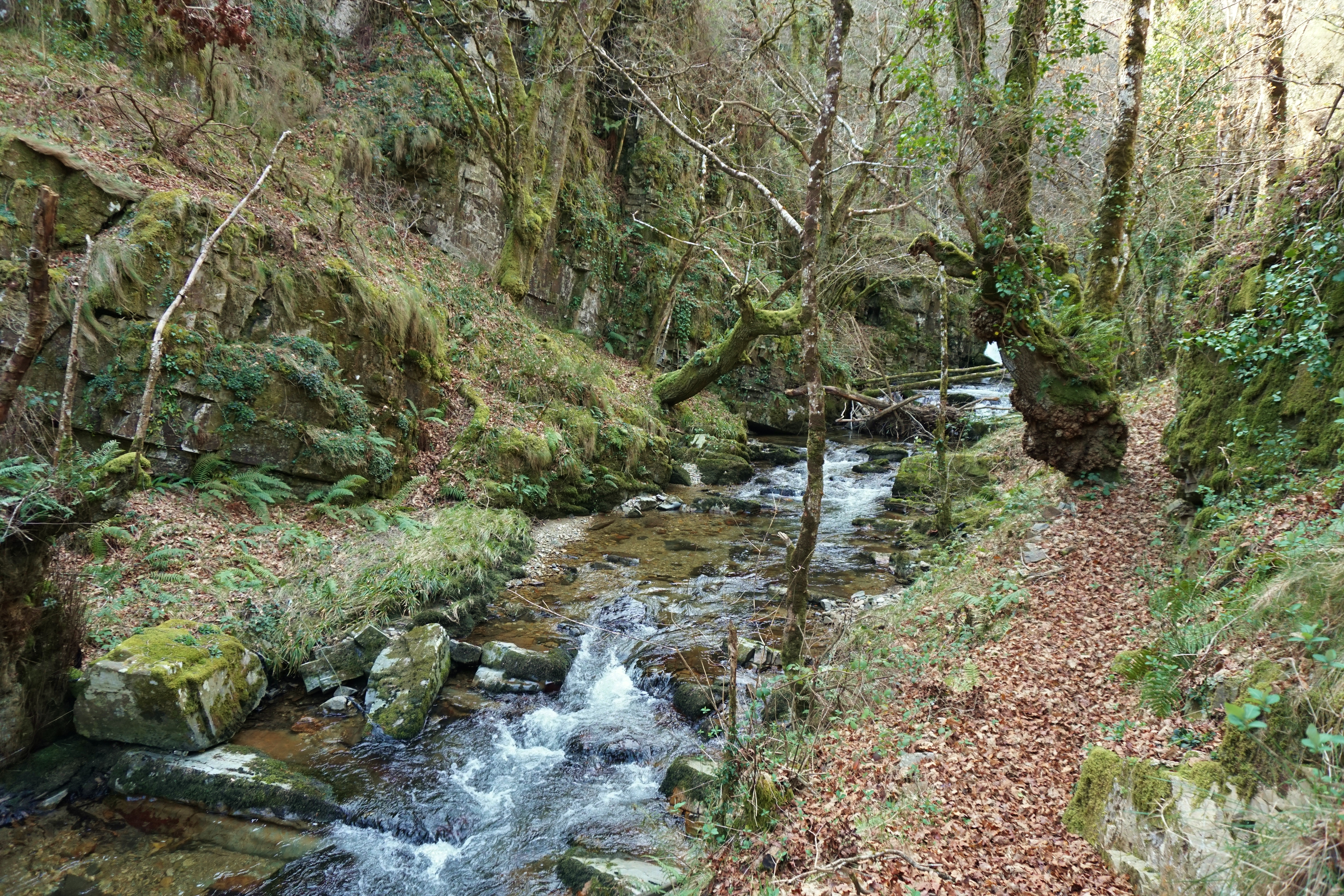 Carballido This is a photography of a Special Area of Conservation in Spain with the ID: ES1120006. Natura2000 entry, EEA entry